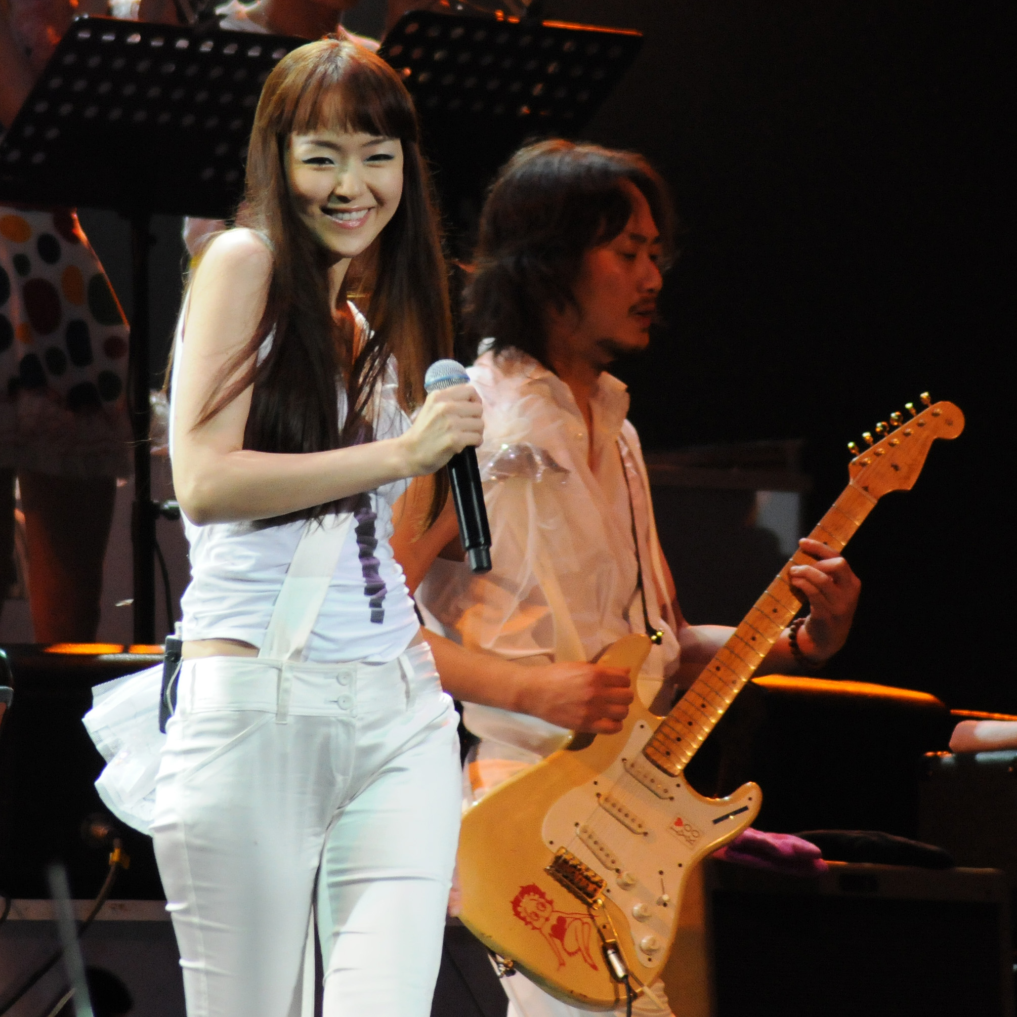 Jul 5, 2008 at 20:42, KOREA Seoul